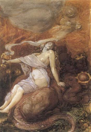 Henry John Stock, The Whore of Babylon.